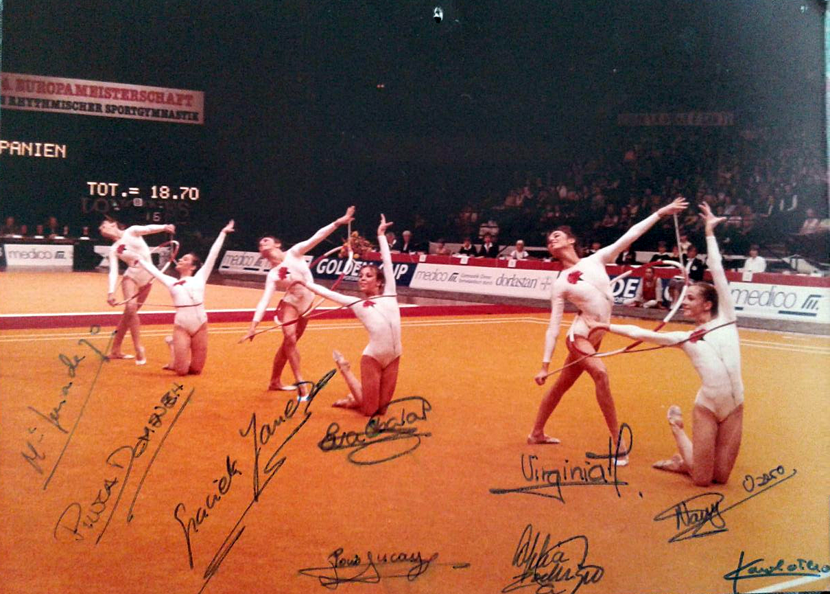 Conjunto español de gimnasia rítmica en el Campeonato Europeo de Viena en 1984. De izquierda a derecha, María Fernández, Pilar Domenech, Graciela Yanes, Eva Obalat, Virginia Manzanera y Nancy Usero.